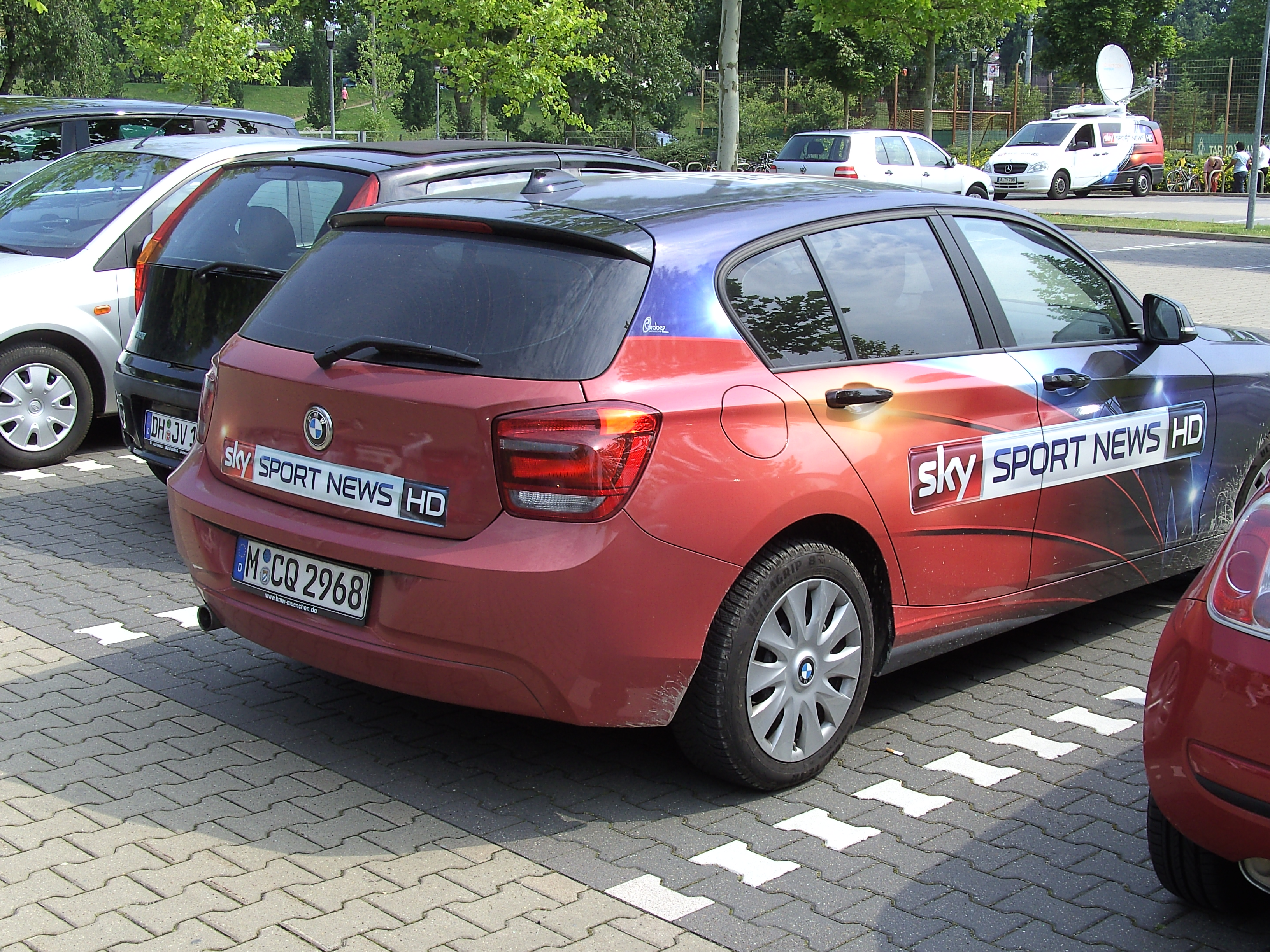 Sky Sport News Reporterwagen vor dem Weserstadion, Bremen; im Hintergrund ein Sky Sport News Satellitenwagen mit aufgestellter Parabolantenne